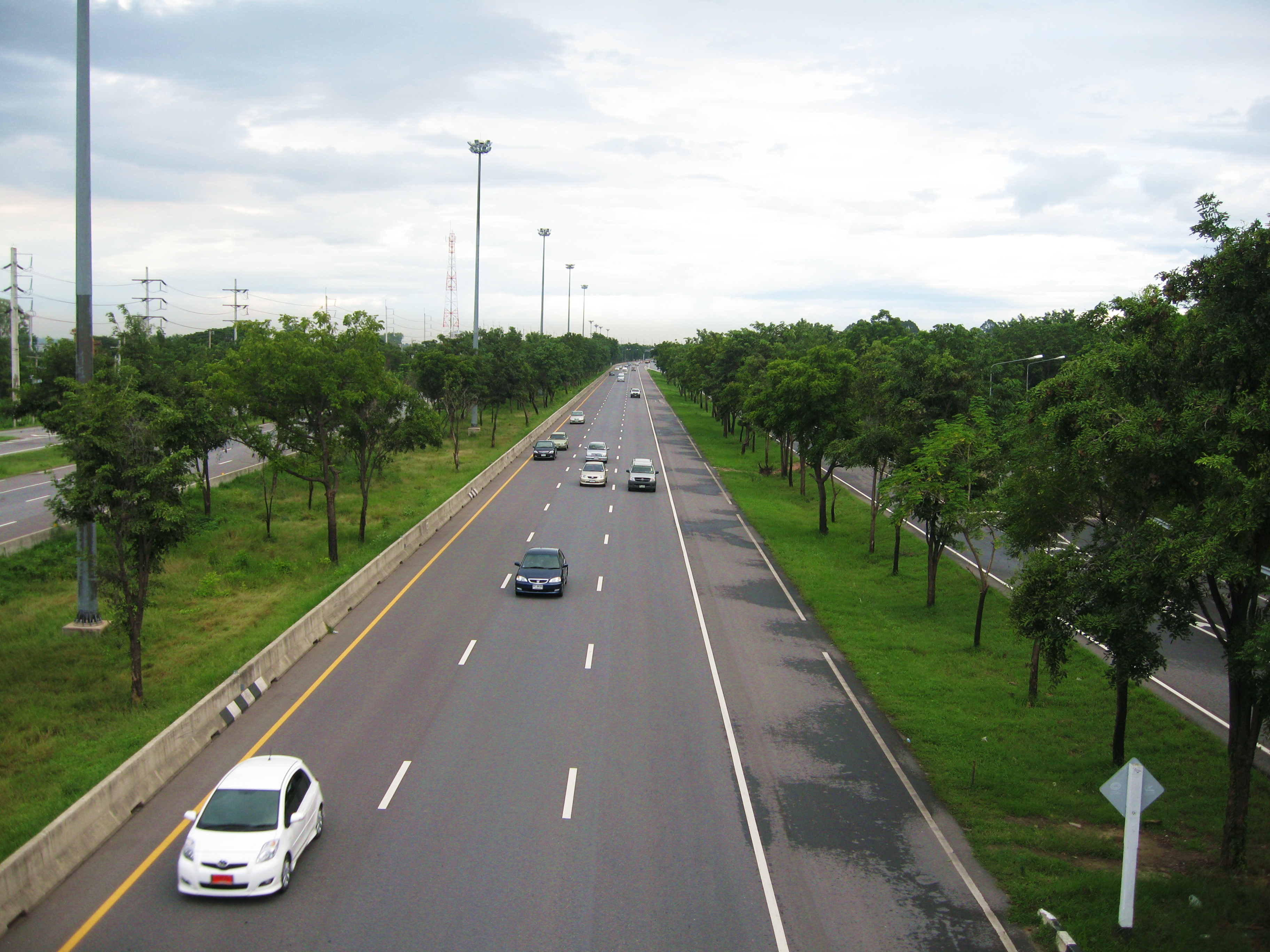 No.32[A-1]Highways@Inburi